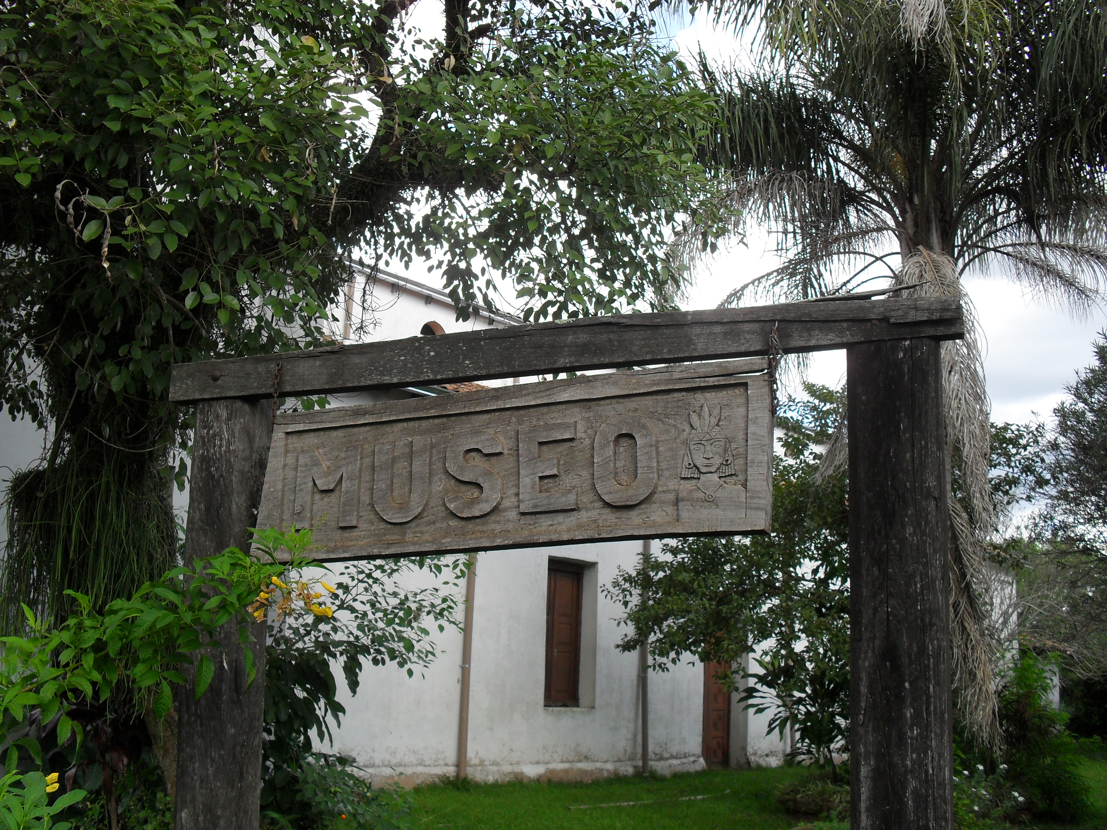 Entrada al Museo de Santiago